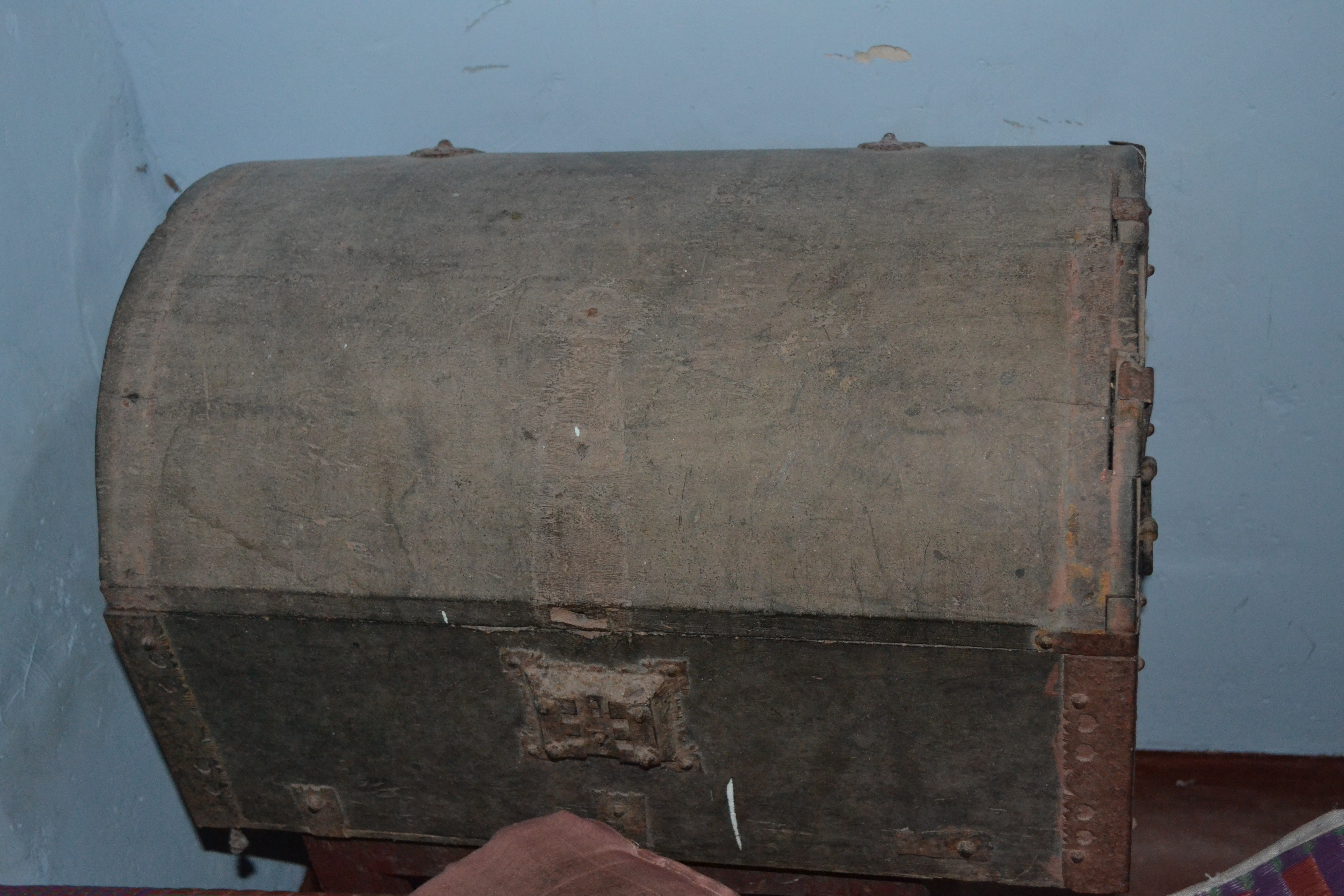 തുണികൾ വയ്ക്കുന്നതിനു ഉപയോഗിച്ചിരുന്ന പെട്ടി.